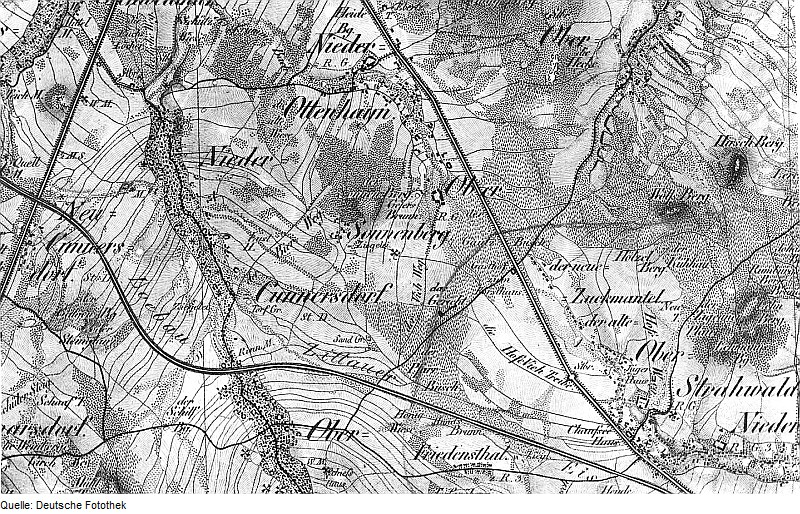 Original image description from the Deutsche Fotothek Niedercunnersdorf-Ottenhain. Oberreit, Sect. Zittau, 1844/46